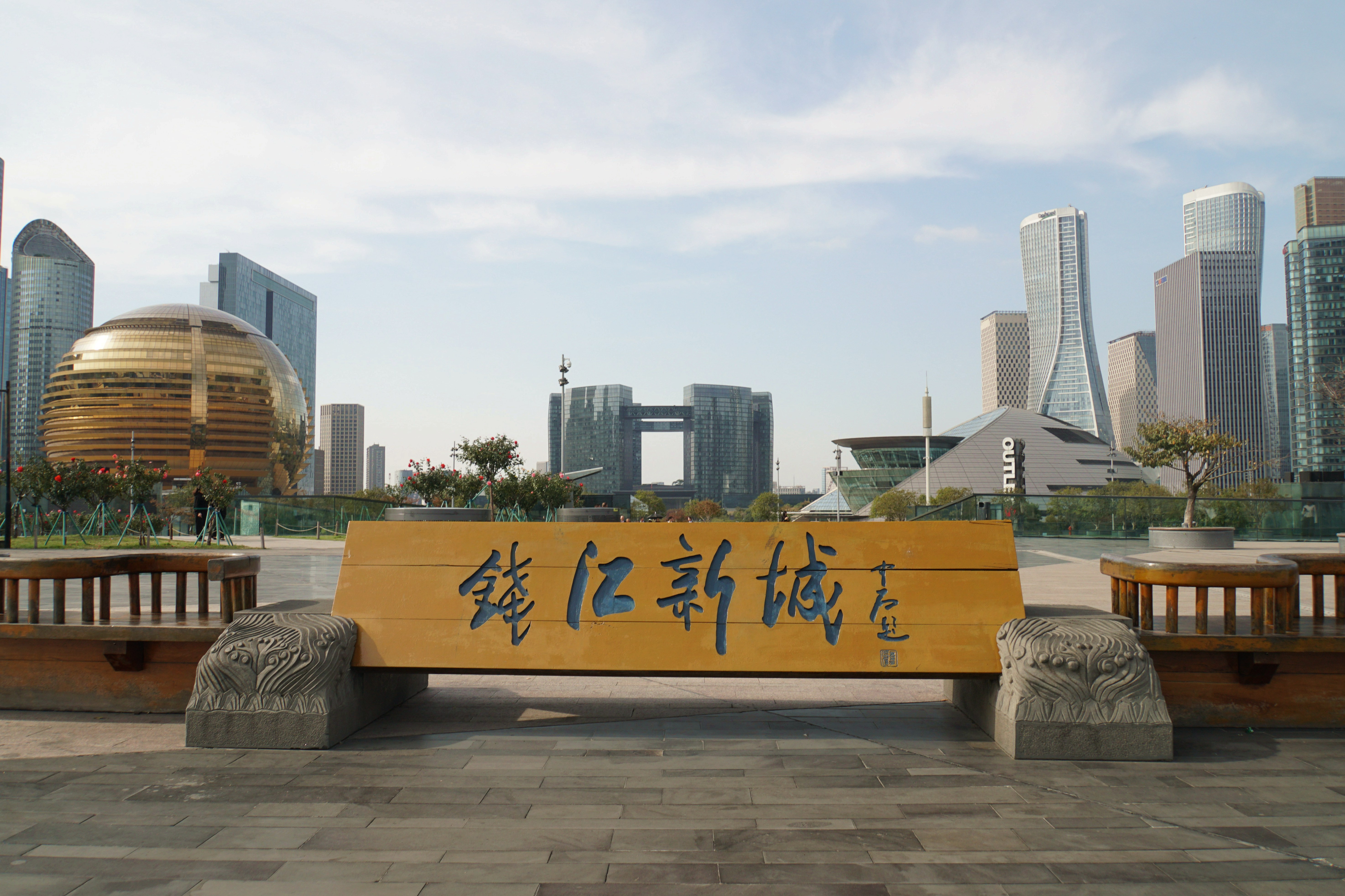 从城市阳台logo观看钱江新城